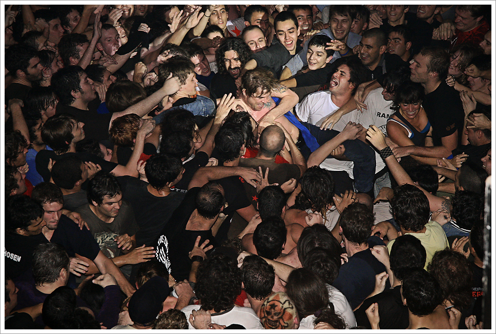 La banda punk alemana Die Toten Hosen presentándose en vivo en El Teatro de Buenos Aires. Find the singer.